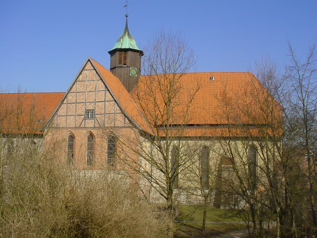 Südansicht der Klosterkirche Oldenstadt in Uelzen, Niedersachsen, Deutschland